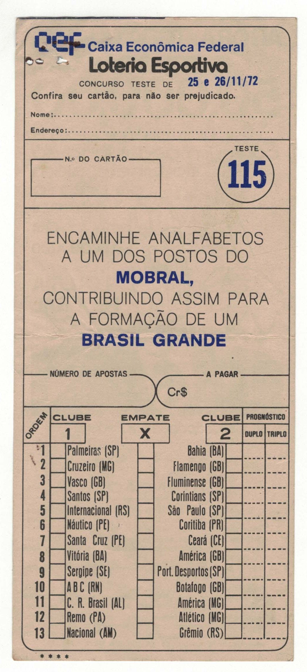 Um bilhete da Loteria Esportiva da Caixa Econômica Federal dos dias 25 e 26 de novembro de 1972. Nota-se que tem mensagem sobre o MOBRAL